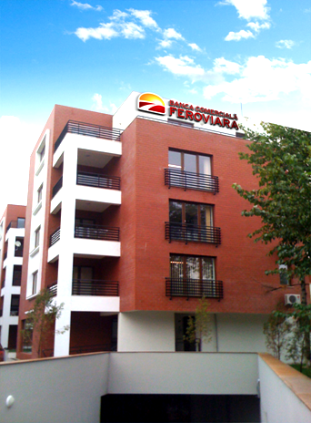 Sediu Central BCF